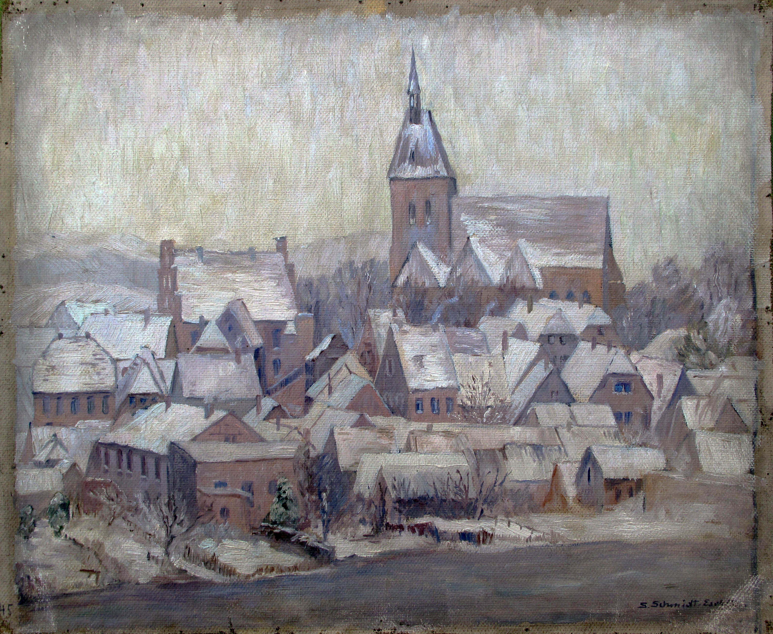 Fotografische Reproduktion eines Gemäldes, Öl auf Leinwand, mit der Ansicht einer Kleinstadt an einem Flußlauf im Winter, 47 x 37 cm, rechts unten signiert, links unten (datiert?) 45